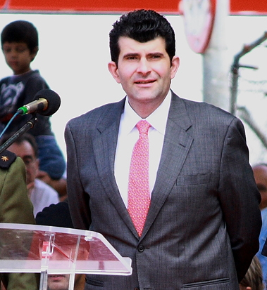 Bartolomé González Jiménez